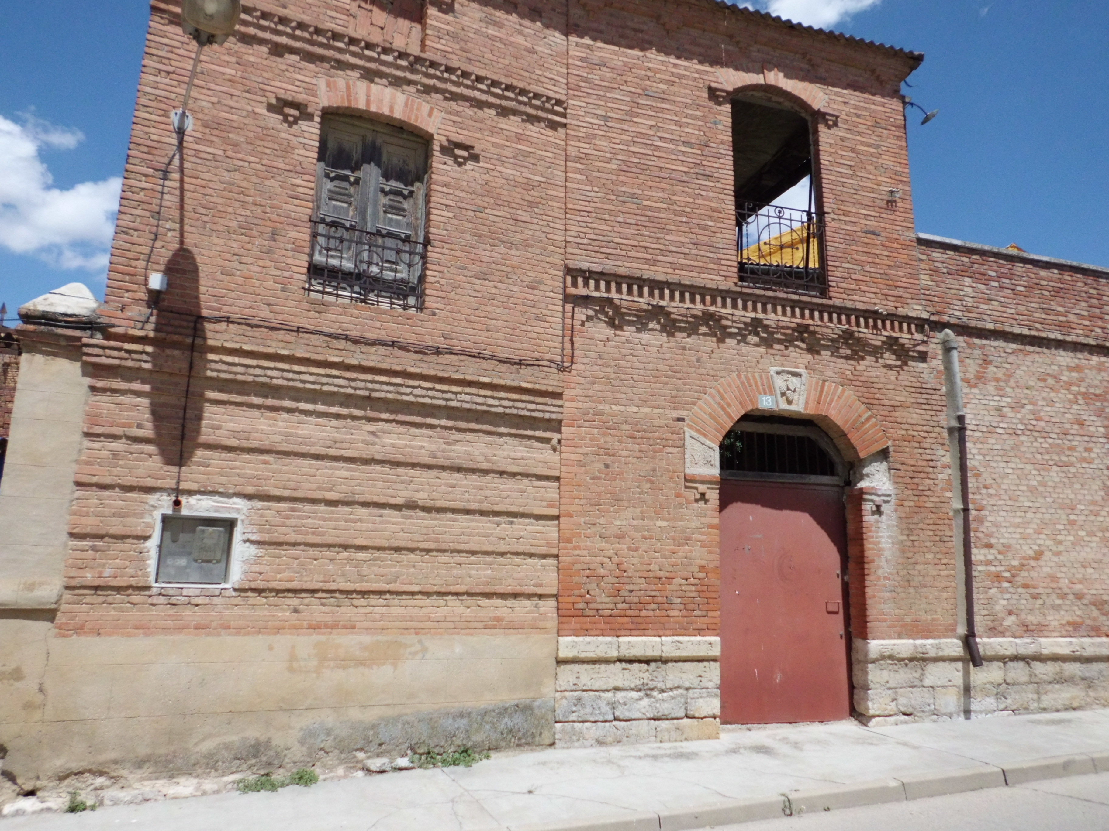 Restos del edificio modernista de las antiguas Bodegas del Obispo en la ciudad de Cigales, Valladolid, España.